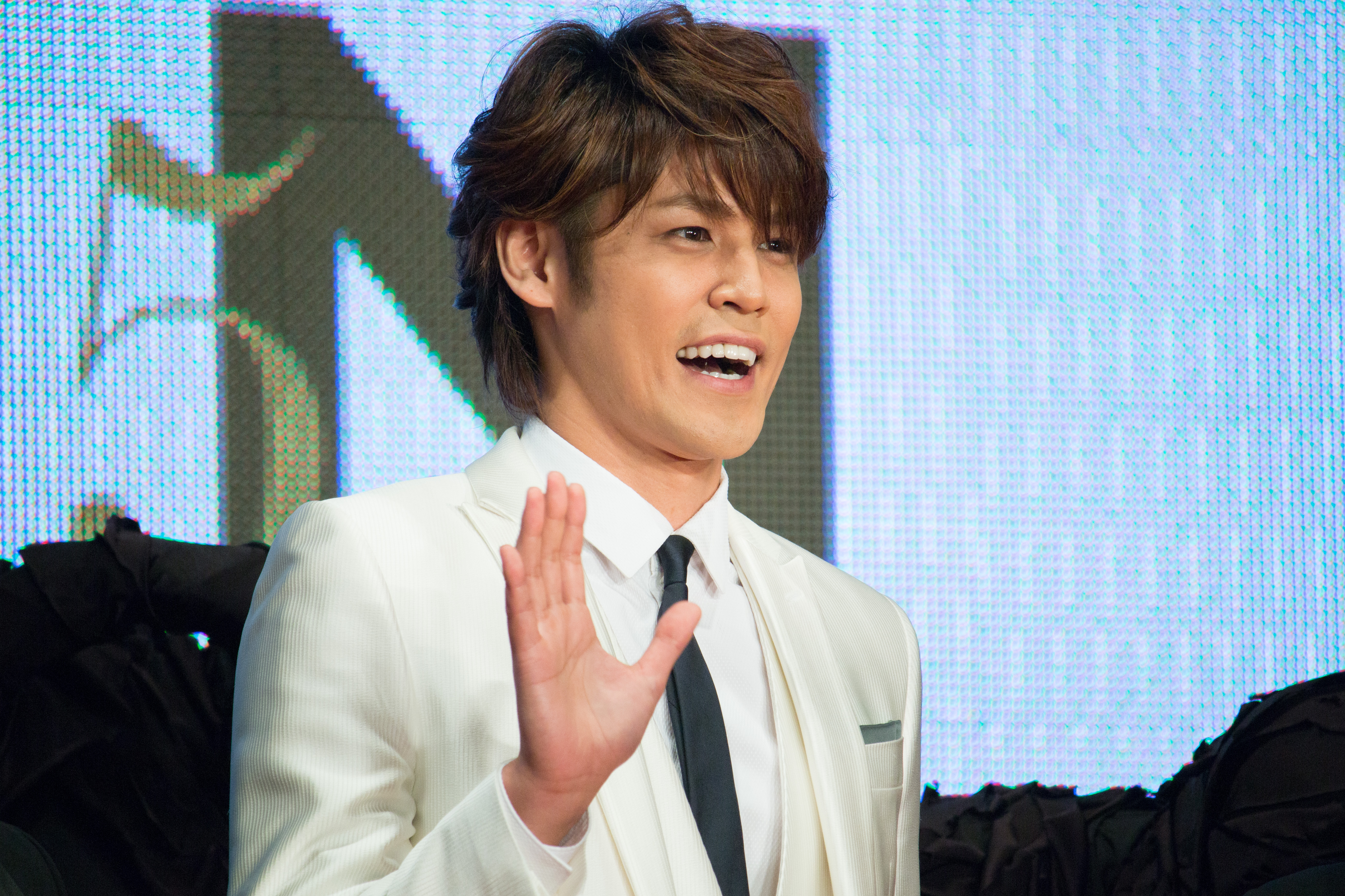 第28回 東京国際映画祭 オープニングセレモニー 宮野真守 (亜人 -衝動-)